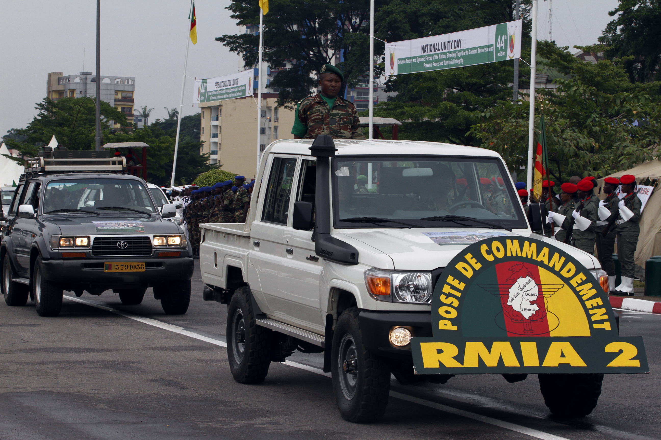 Camion anti émeute de la gendarmerie et de la police à Douala au Cameroun This is an image with the theme "Africa on the Move or Transport" from: Cameroon